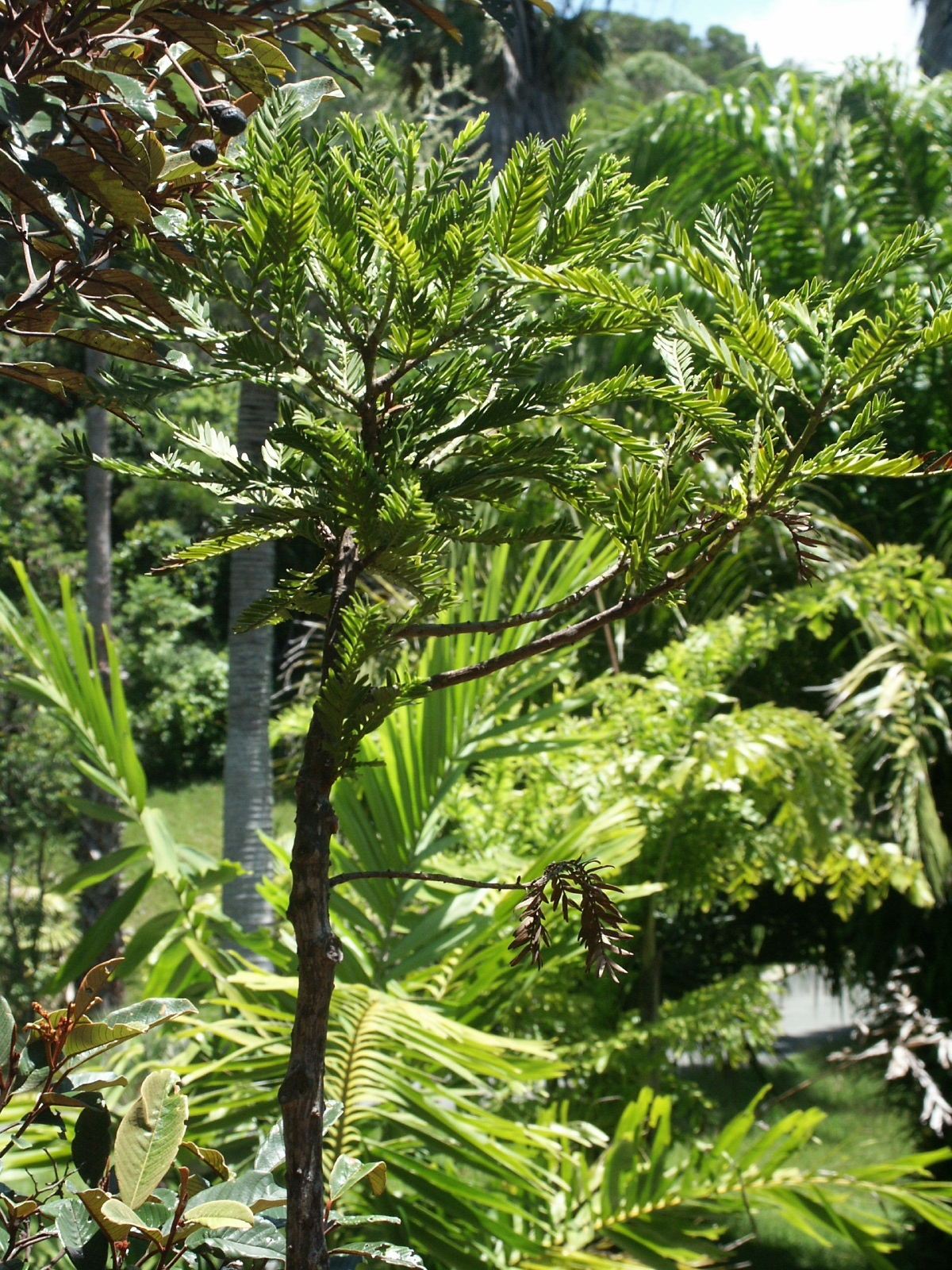 Retrophyllum comptonii (jeune). Parc forestier de Nouméa - Nouvelle-Calédonie